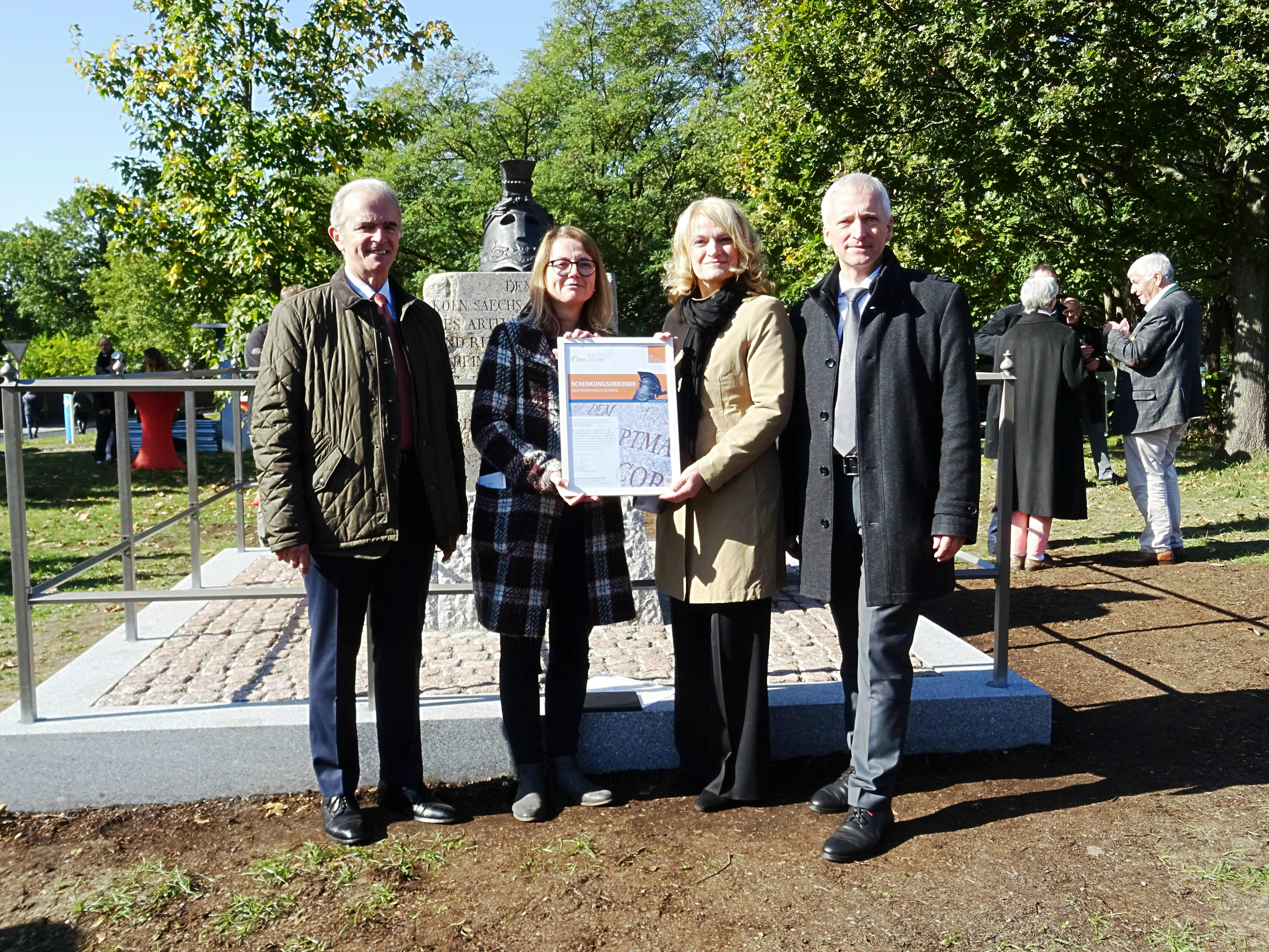 Dresden, Hauptmann Hirsch-Denkmal. Einweihung am 07. Oktober 2019. Maßgeblichen Anteil haben die Firmen Berufliche Trainingszentren Dresden der SRH Berufsbildungswerk Sachsen GmbH Dresden, Steinbildhauer- und Steinmetzwerkstatt Andreas Hempel mit ausführenden Bildhauerleistungen und der Kunstgießerei Gebr. Ihle und weitere.Weitere Förderer sind das Landesamt für Denkmalpflege Sachsen, der St. Heinrichs Orden zu Bamberg e.V. und das Militärhistorische Museum der Bundeswehr. Die Sponsoren stellten rund 30.000 Euro zur Verfügung. Hinzu kommen noch die Eigenleistung von über eintausend Teilnehmerstunden. Königlich-sächsischen Artillerieeinheit flankiert das Denkmal.: Prinz Alexander Markgraf von Meißen Herzog zu Sachsen, Annekatrin Kleppsch 2. Bürgermeisterin, Silke Droth und SRH-Geschäftsführer Marcus von Oppen